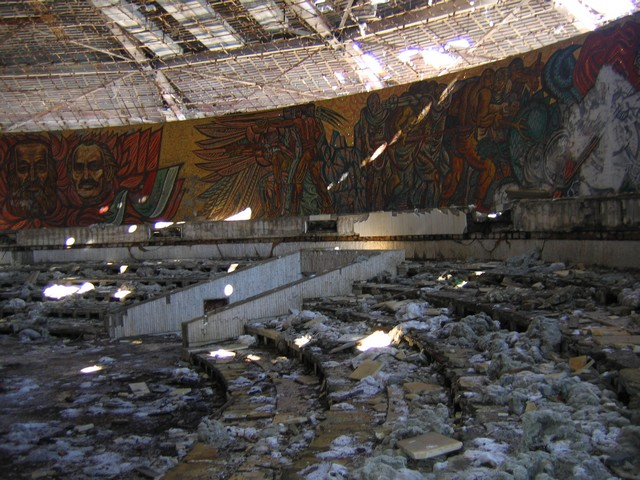 Interieur en ruine de la salle de congres de Bouzloudja.